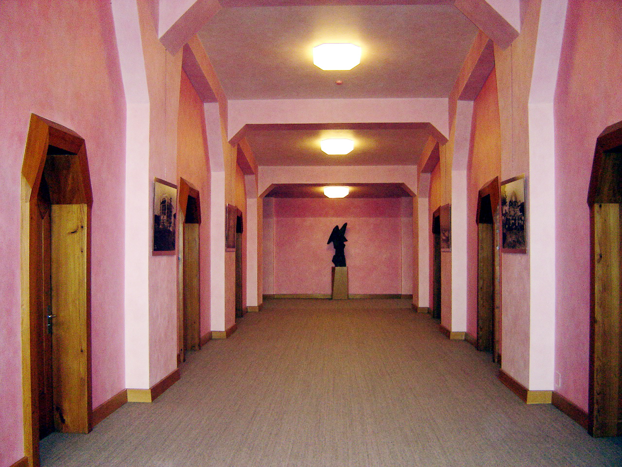 Goetheanum Innenansicht, Dornach SO Schweiz